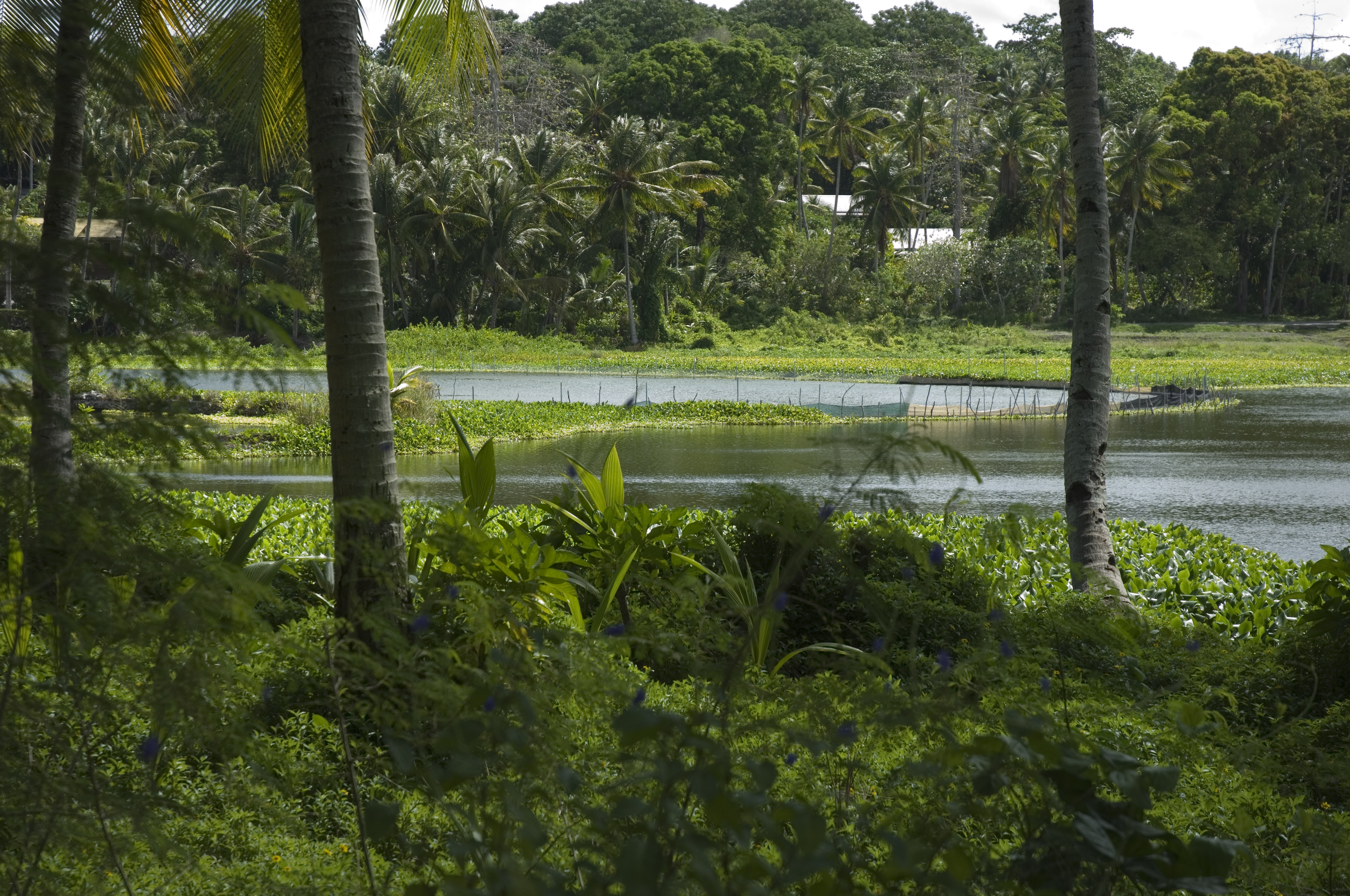 Buada Lagoon, Nauru 2007.